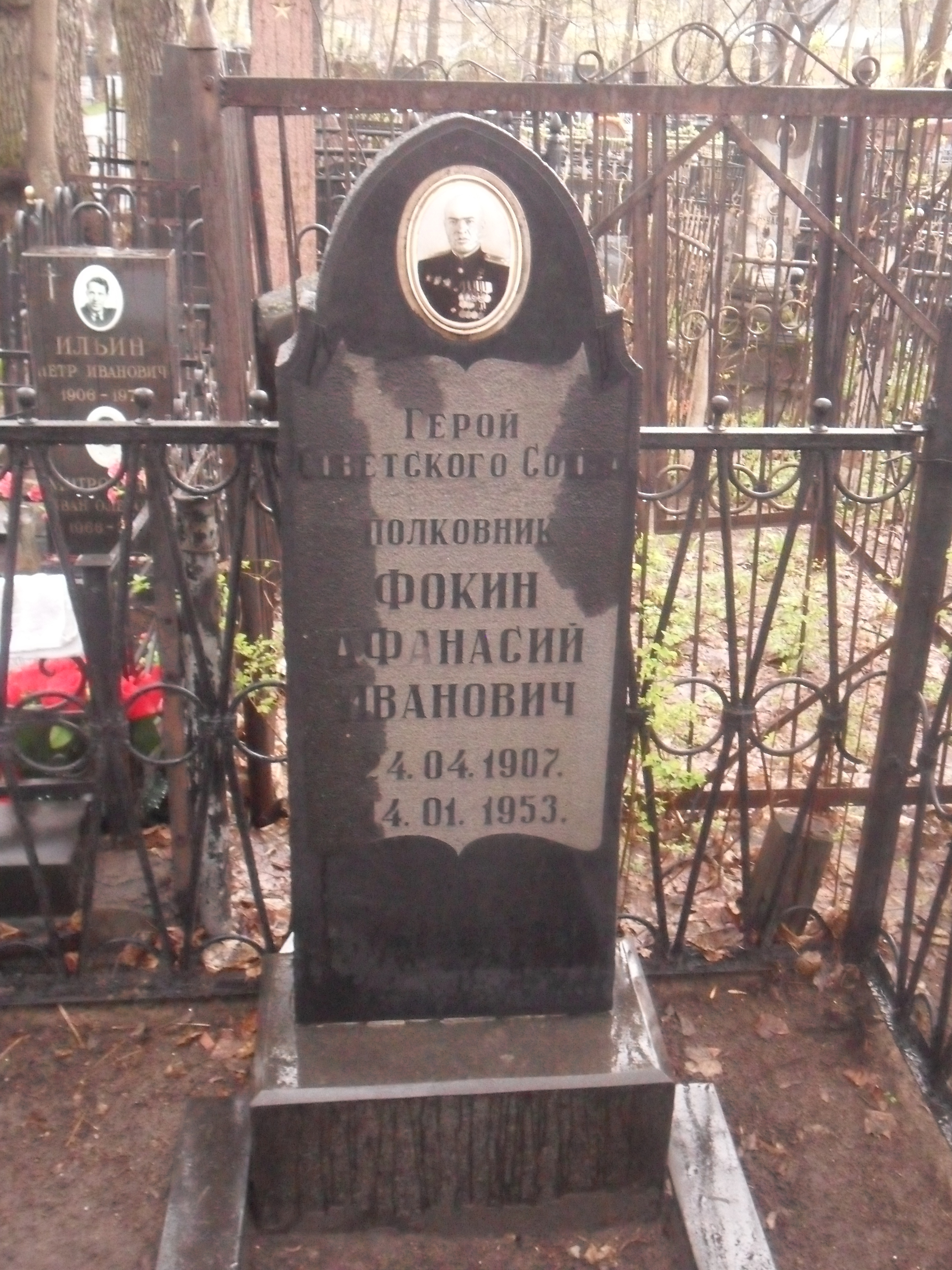 Могила (возможно, кенотаф) Героя Советского Союза Афанасия Фокина на Ваганьковском кладбище Москвы.